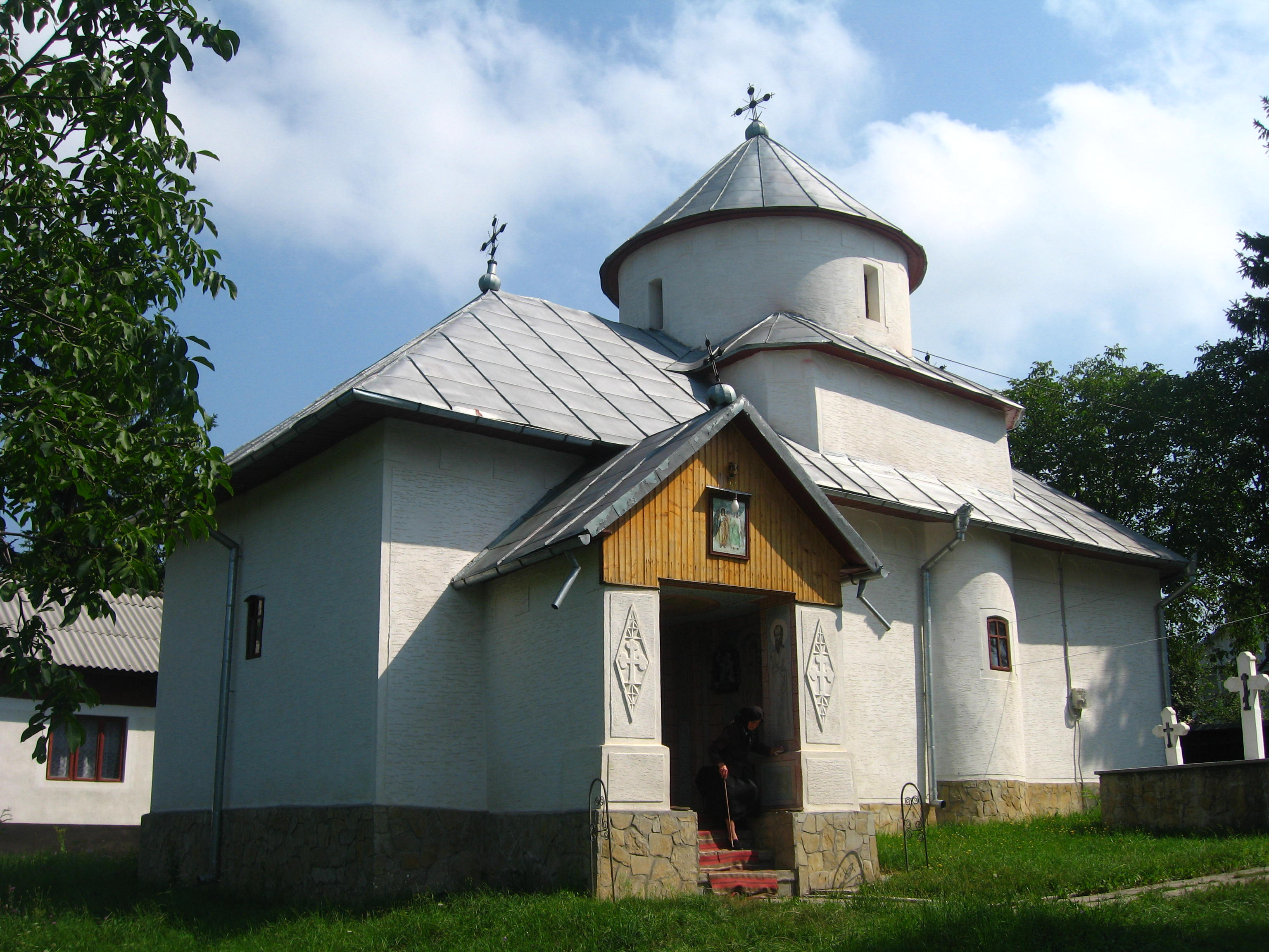 Biserica Sf. Arhangheli din Calinesti-Cuparencu